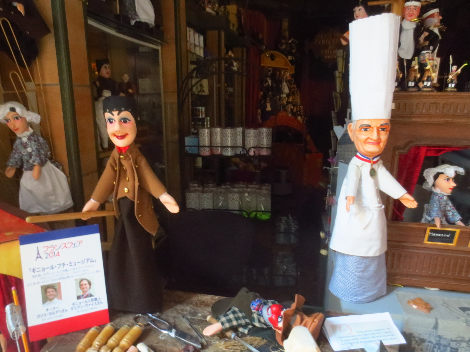 Saint-Jean (Lyon) - Guignol et Paul Bocuse - Théâtre du Guignol de Lyon